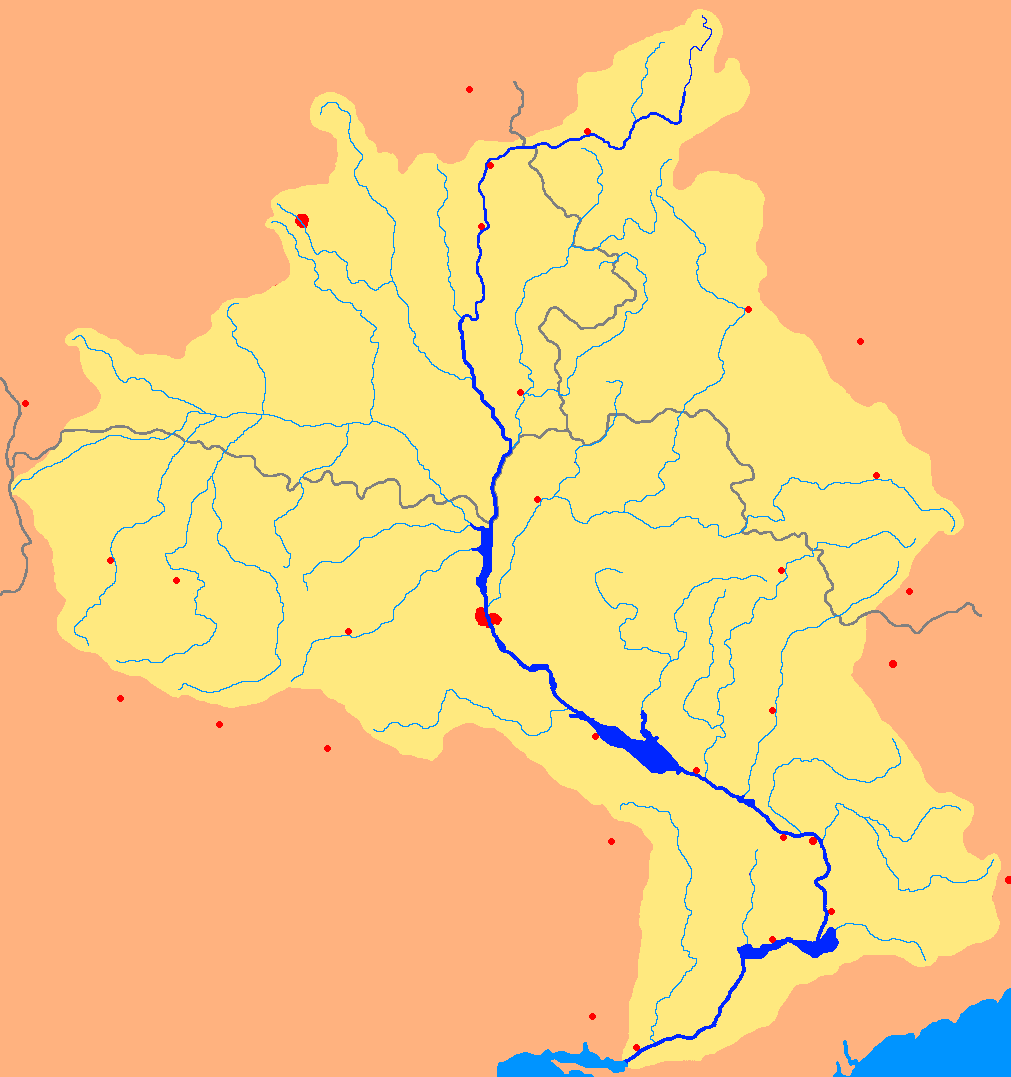 Dnepr basin BLANCO